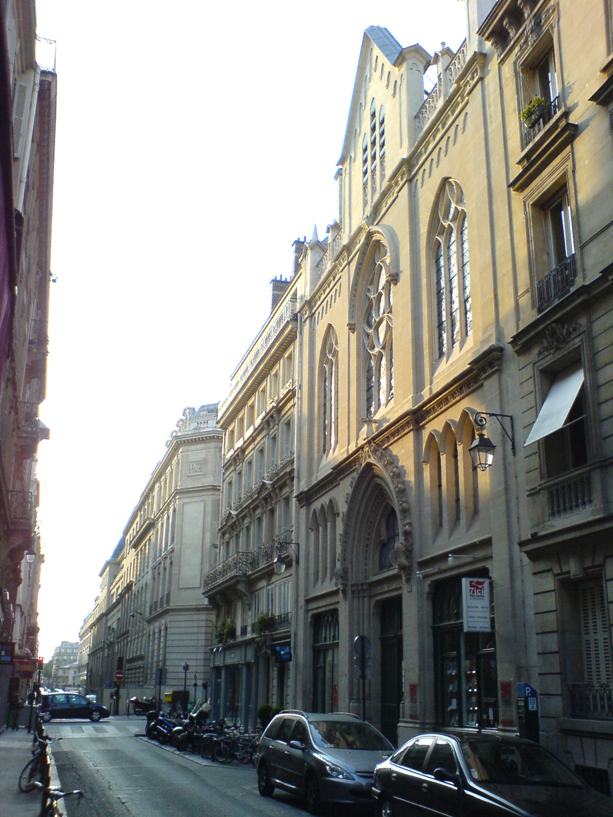 Église Évangélique Baptiste, 48 rue de Lille